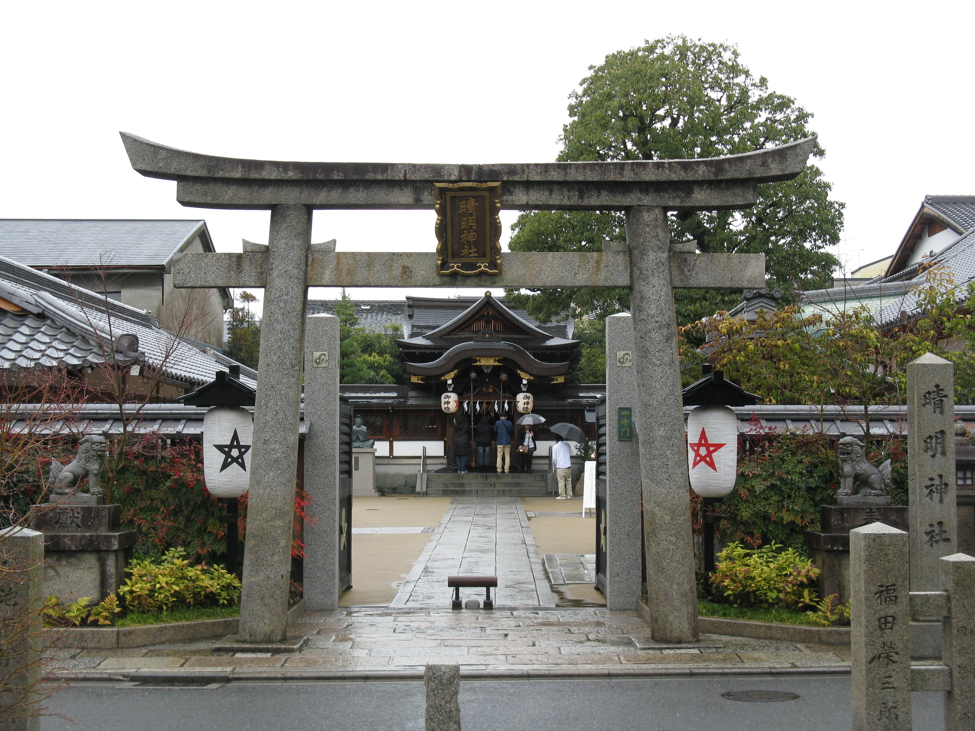 晴明神社 鳥居